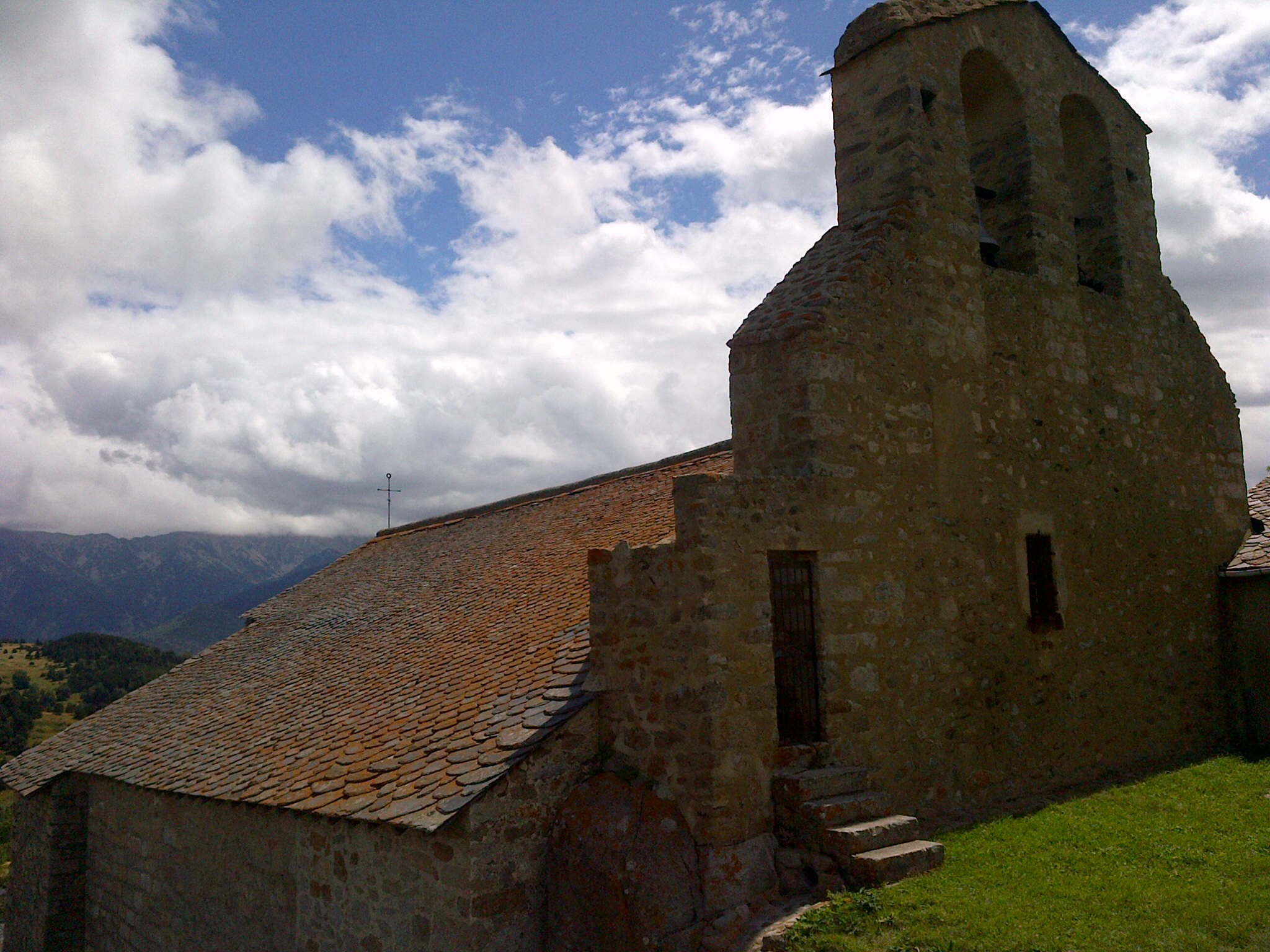 església romànica situada a La Llaguna, a la comarca del Capcir, a la Catalunya del Nord, departament francès dels Pirineus Orientals